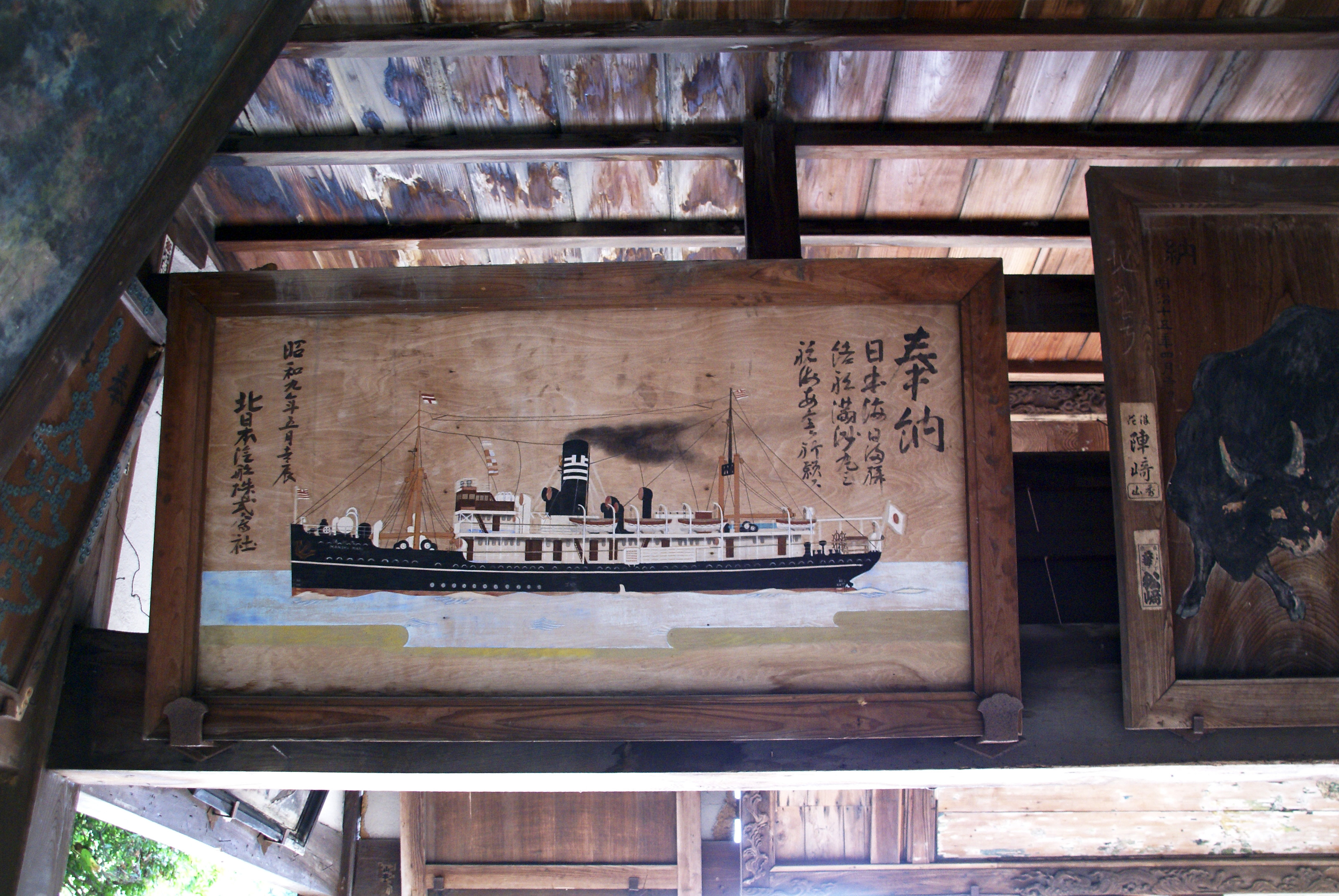 Kehi-jingu in Tsuruga, Fukui prefecture, Japan